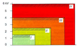 Impulssliigpingetaluvuse kategooriad nimipingel 230/400V